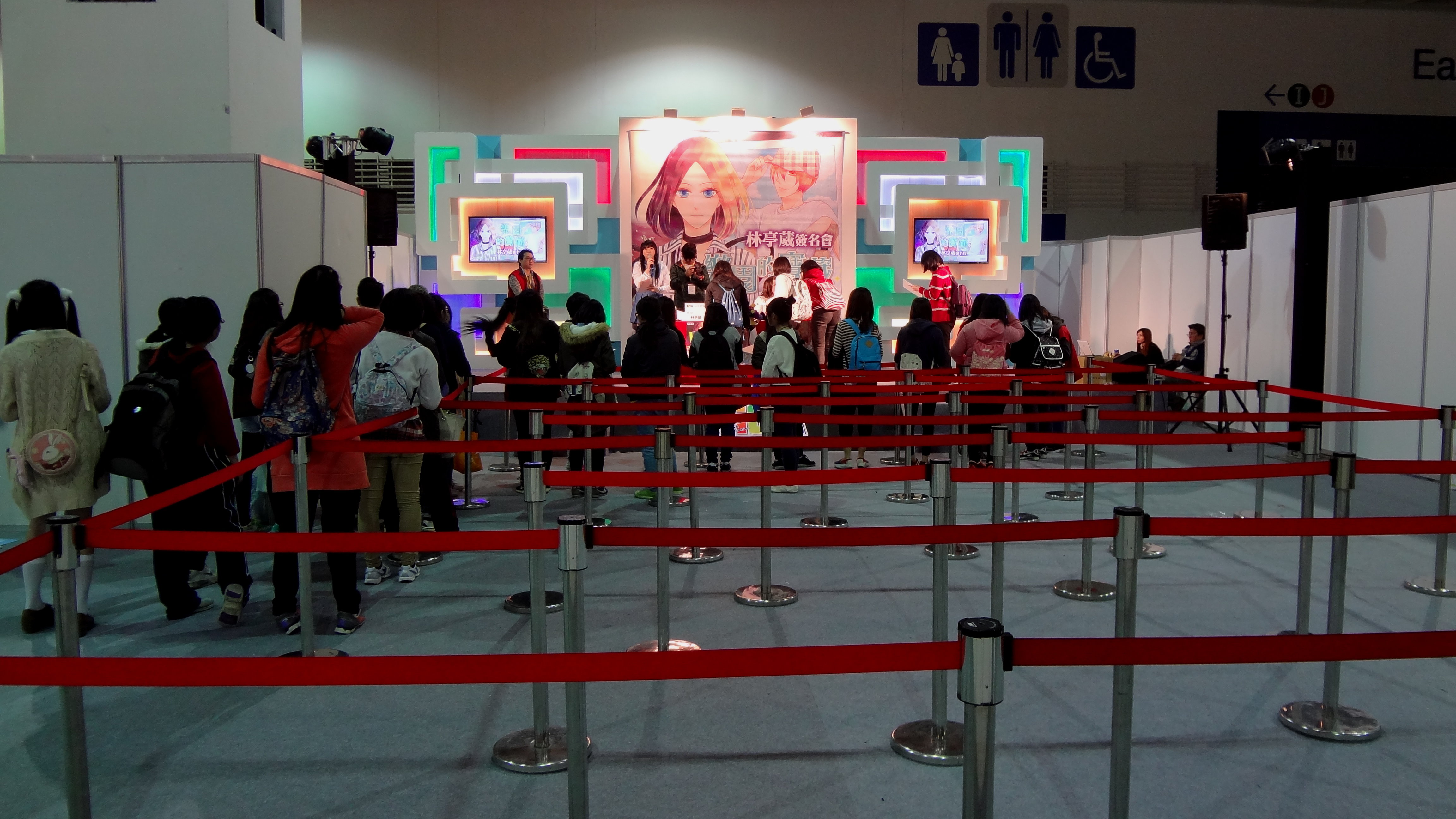 2016年第四屆台北國際動漫節B舞台，尖端出版漫畫家林亭葳《樂園的寶藏》簽名會。